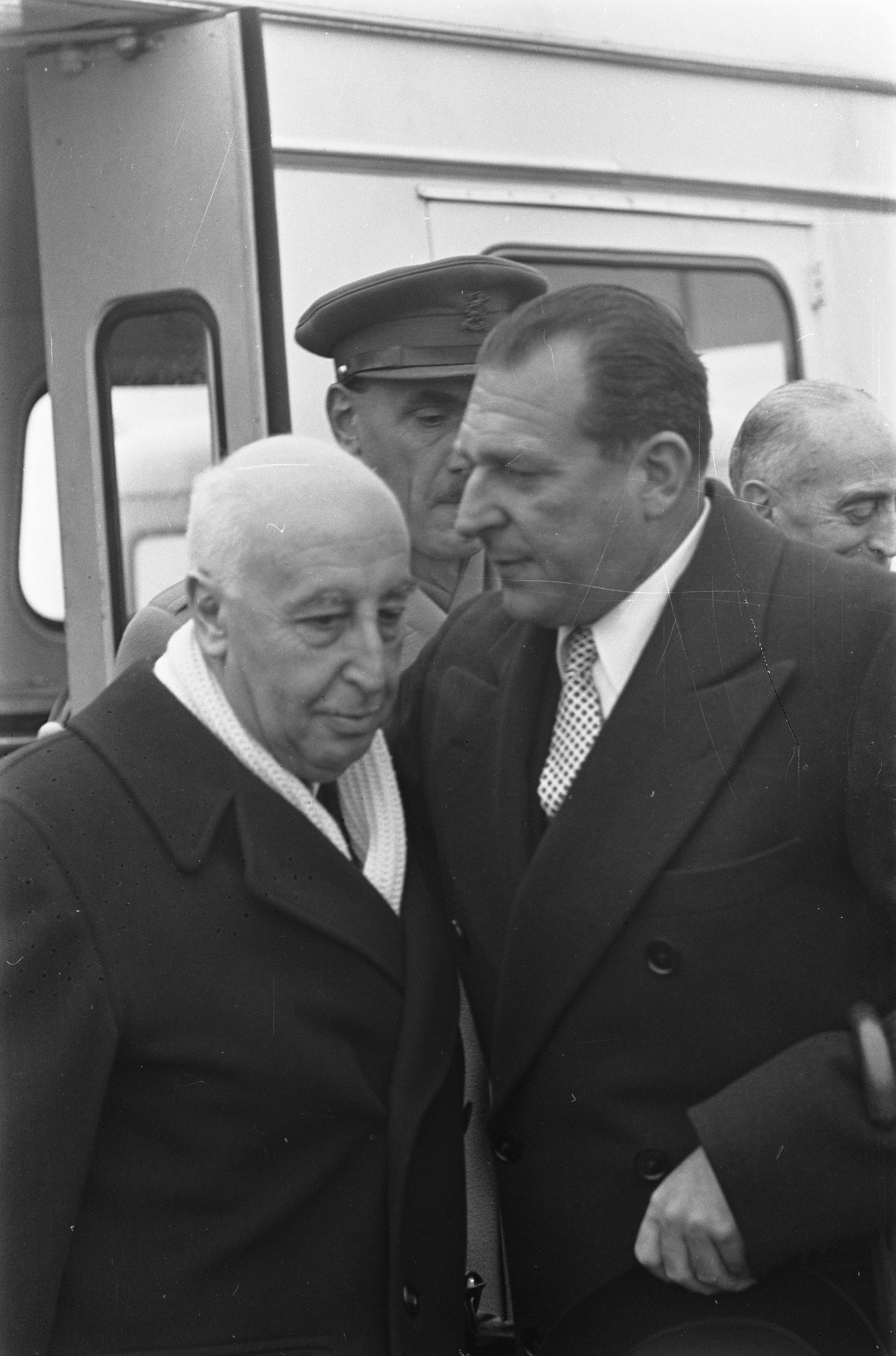 Collectie / Archief : Fotocollectie Anefo Reportage / Serie : [ onbekend ] Beschrijving : Vertrek van Spaanse Troonpretendent Don Juan de Bourbon. Links de Hertog van Baena (José María Ruiz de Arana y Bauer), Spaans ambassadeur in Nederland, rechts Don Juan de Bourbon, Graaf van Barcelona. Datum : 12 november 1959 Locatie : Nederland, Spanje Trefwoorden : diplomaten, vorstenhuizen Persoonsnaam : Baena de, Bourbon Juan de Fotograaf : Pot, Harry / Anefo Auteursrechthebbende : Nationaal Archief Materiaalsoort : Negatief (zwart/wit) Nummer archiefinventaris : bekijk toegang 2.24.01.05 Bestanddeelnummer : 910-8167